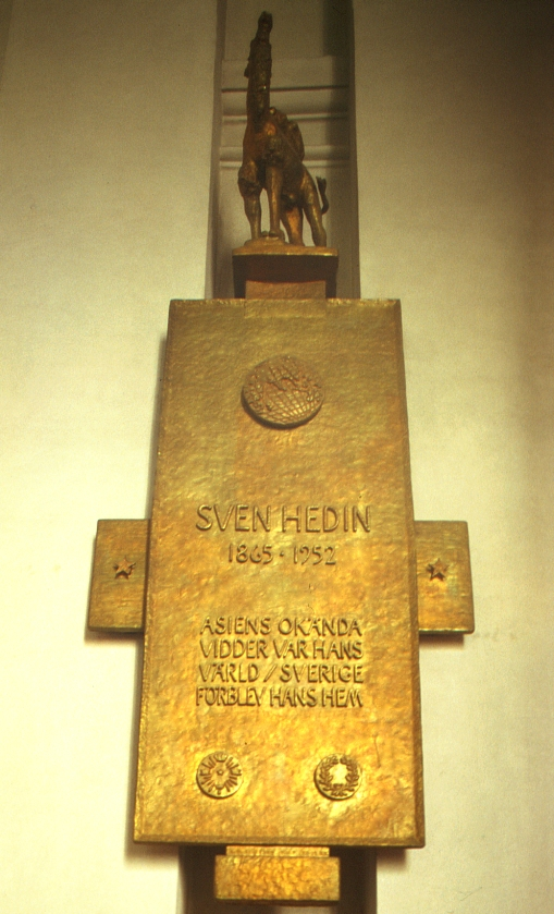 en: Sven Hedin monument by Liss Erikson (1959) in the Adolf Fredriks Kyrka in the Adolf Fredriks kyrka in Stockholm. de: Epitaph für Sven Hedin von Liss Erikson (1959) in der Adolf Fredriks Kyrka in Stockholm. Es trägt in schwedischer Sprache die Inschrift: Asiens unbekannte Weiten waren seine Welt – Schweden blieb sein Zuhause. Es zeigt Asien auf dem Globus, und es wird gekrönt von einem Kamel.